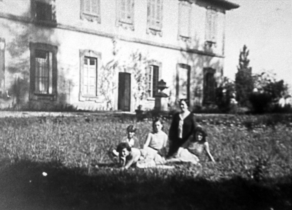 Uno scorcio del maniero dei nobili Sessa alla Cascina Ravajola in Arzago d'Adda.